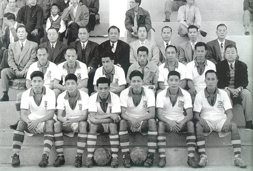 傑志足球隊於1959年赴澳籌款義賽 第三排：蔣偉棠、趙啟文、宋子賢、伍球添、譚志、王山、袁添容； 第二排：李洪祺、吳祺祥、杜永權、郭秋明、雷樹萍、郭有、黎兆榮； 最前排：劉儀、龔華傑、郭有、劉繼照、林尚義、譚榕根